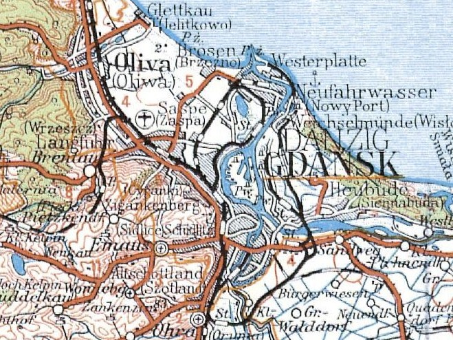 Gdańsk na Mapie Operacyjnej Polski.